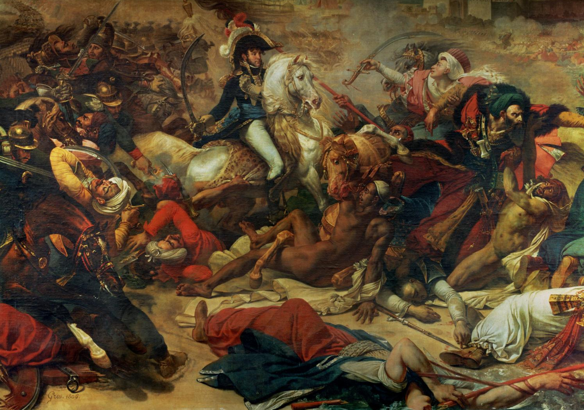 Bataille d´Aboukir, 25 juillet 1799, 1806